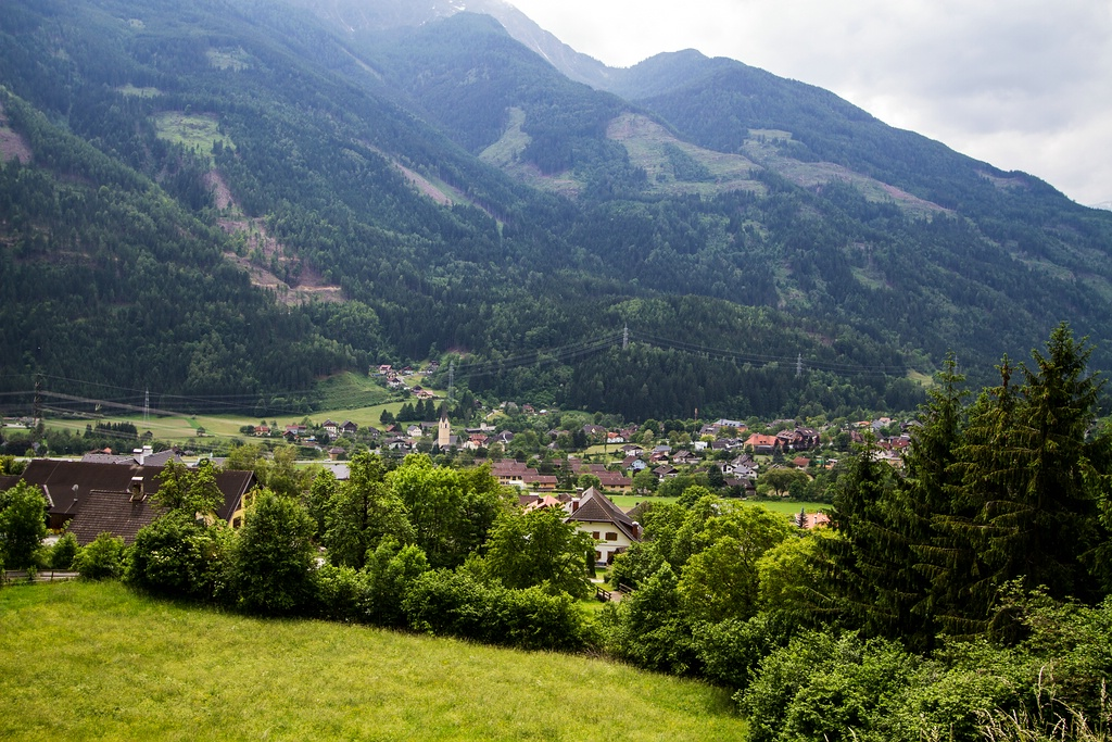 Kolbnitz von der Talstation der Reißeckbahn aus